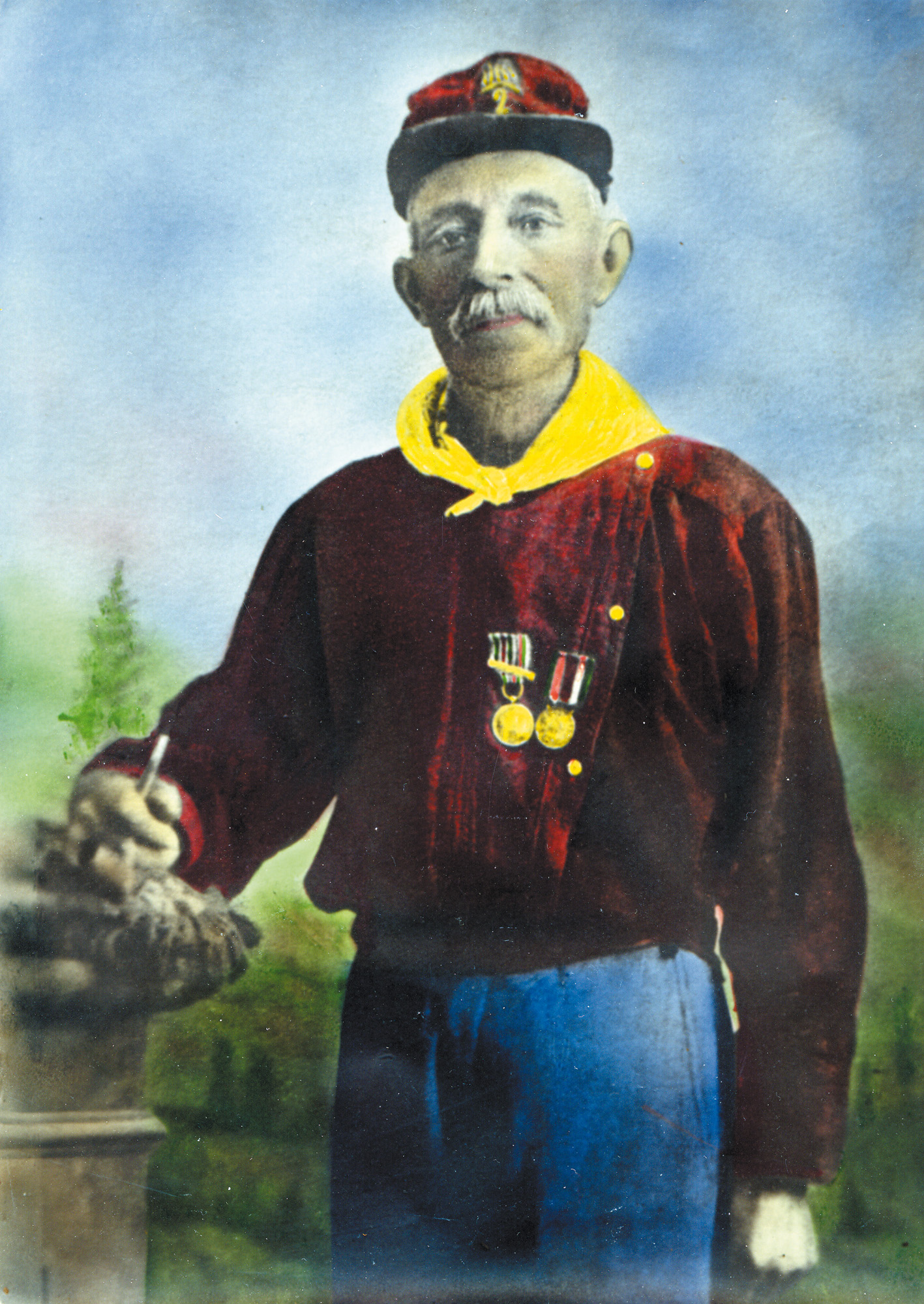 Bortolo Cunico in posa con la divisa da Garibaldino. Sulla camicia rossa, due delle tre medaglie ottenute con la militanza nel Corpo dei Volontari Italiani. La fotografia è dei primi del '900 ed è stata colorata artificialmente.